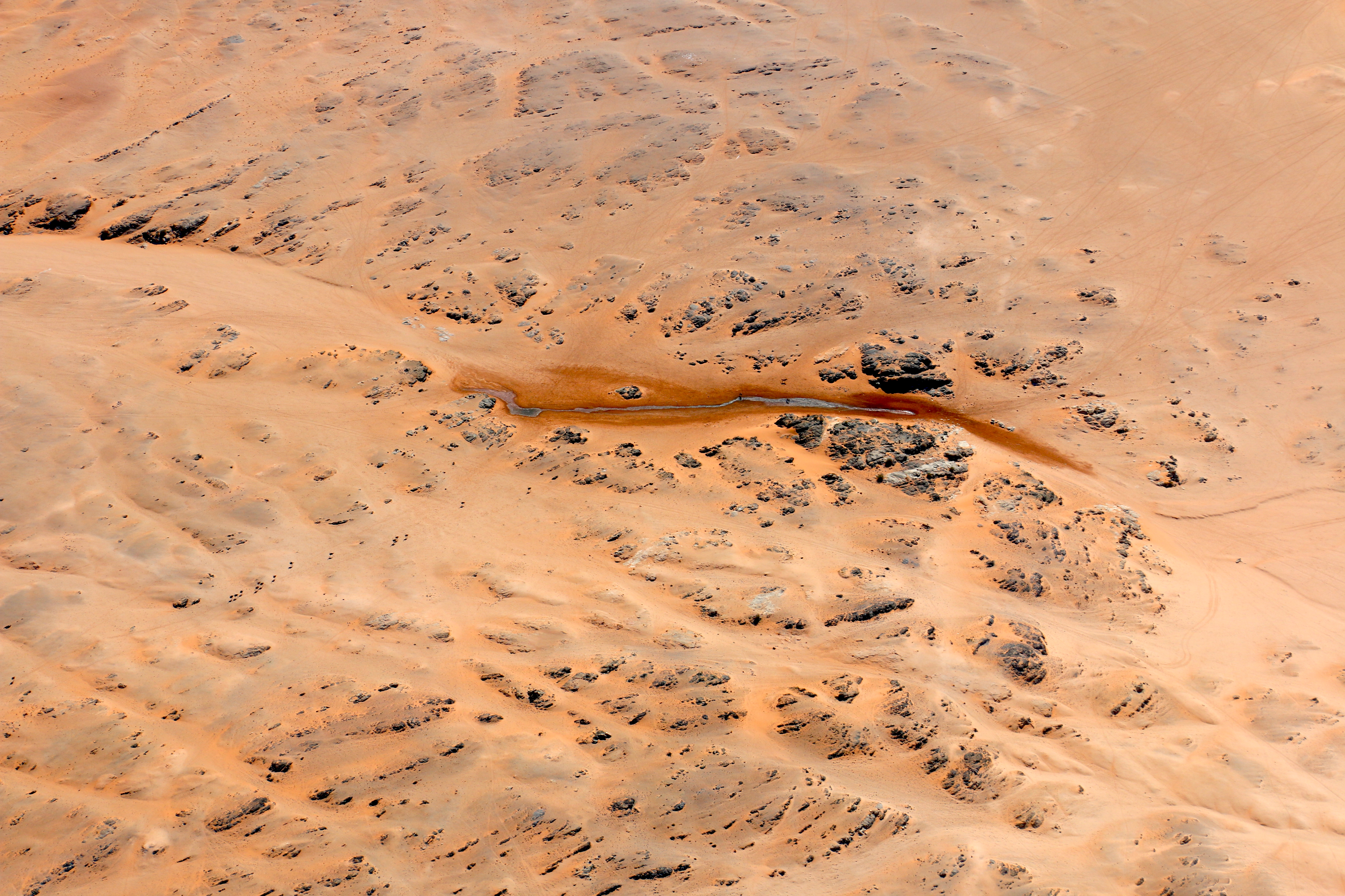 Quelle Kaukausib (2016)